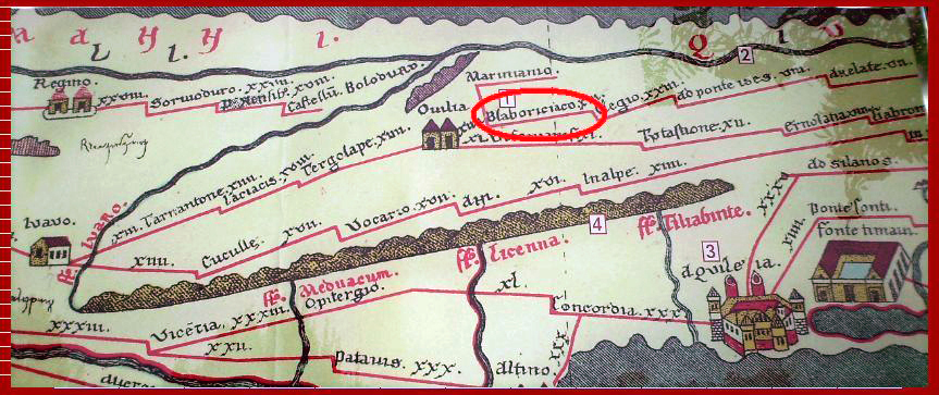 Lauriacum auf der Tabula Peutingeriana (Blaboriciaco)